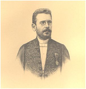 Gustave LARROUMET (1852-1903), Docteur ès-lettres, professeur d'histoire à la Sorbonne, écrivain, haut fonctionnaire, directeur de l'École des beaux-arts, officier de la Légion d'honneur, chevalier des Palmes académiques